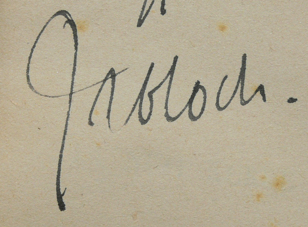 Jean-Richard Bloch - signature